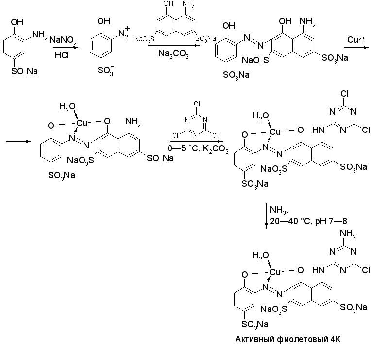 Схема синтеза монохлортриазинового медьсодержащего активного красителя Активного фиолетового 4К